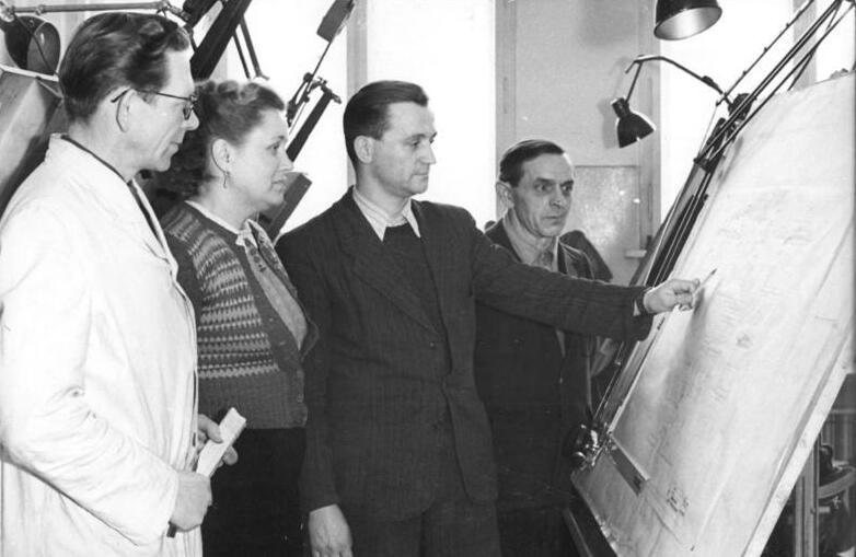 Ingenieure am Reissbrett Illus Quaschinsky Ko-Be 2.3.1951 Schwerpunkte der volkseigenen Industrie. VEB Schwermaschinenbau ABUS Wildau.Der volkseigenen Schwermaschinenbau ABUS Wildau wird künftig einer der bedeutendsten Industriebetriebe in der Deutschen Demokratischen Republik sien. In diesem Werk werden vor allem Walzwerkausrüstungen und Bergwerksgeräte hergestellt. Noch in diesem Jahre sollen neue Walzstraßen für die Stahl- und Walzwerke Maxhütte, Brandenburg und Döhlen geliefert werden. UBz-Konstrukteur Paul Müller verpflichtete sich, die fehlenden und nicht zu beschaffenden Teile einer Stoßmaschine schnellstens zu konstruieren. vlnr: Brigadeleiter Paul Müller, Fuar Charlotte Fischer, der Chef des Konstruktionsbüros Nikolaus (gehört nicht zu Brigade) und Emil Müller.